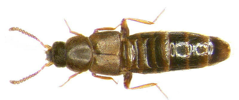 Familie: Staphylinidae Grösse: 3,2-3,8 mm Verbreitung: Europa Ökologie: an Saftflüssen Fundort: Germania, Hessen, Darmstadt, Gernsheim leg. A.Skale, 2003; det. U.Schmidt Foto: U.Schmidt, 2006